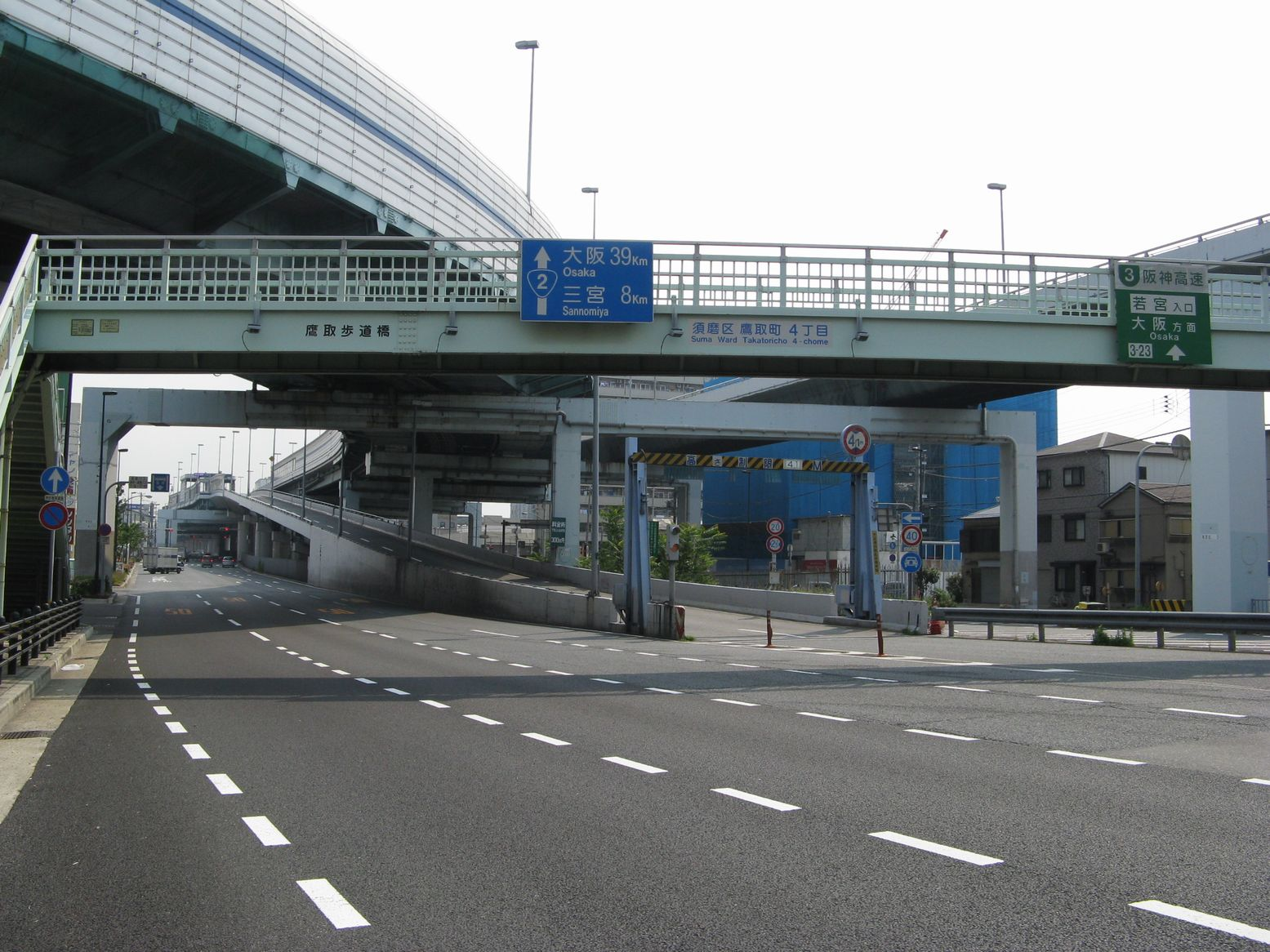 阪神高速若宮入口 東望 左上が「若宮カーブ」